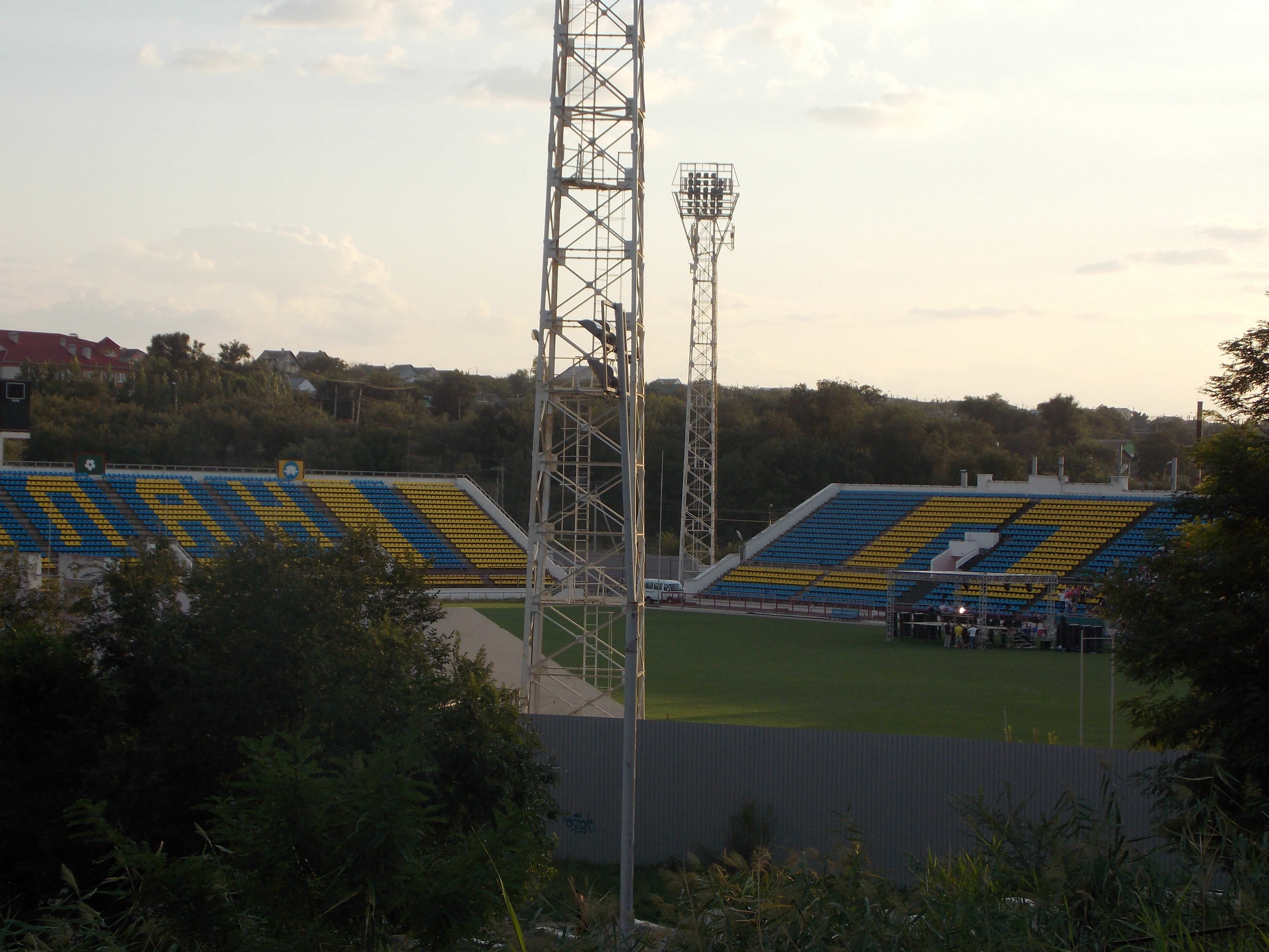 Стадион "Уралан", Элиста, Калмыкия